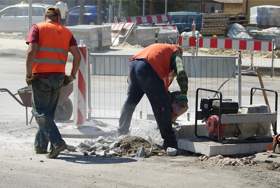 Praca Niemcy